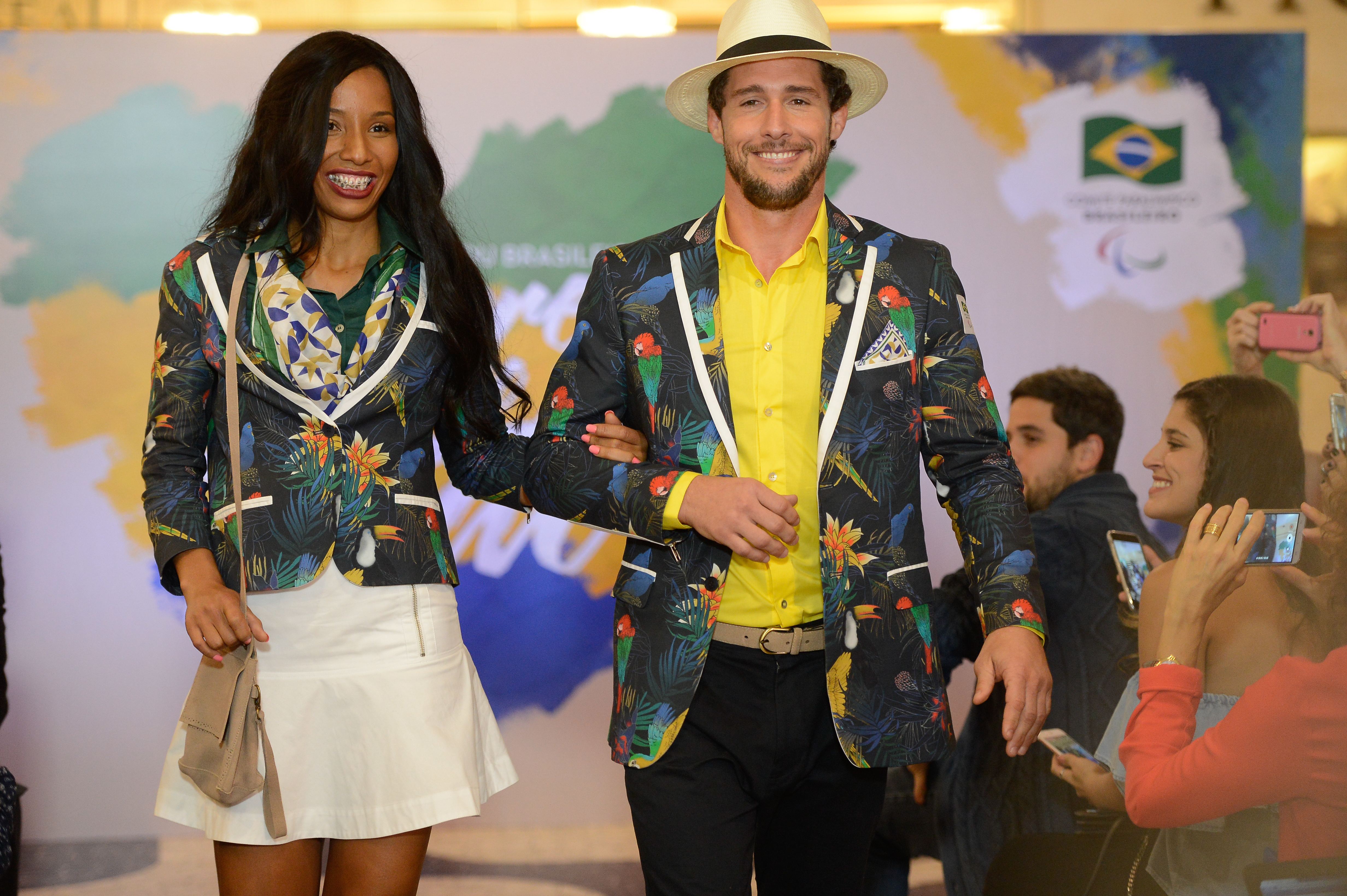 Rio de Janeiro - A atleta paralímpica Silvânia Costa e o embaixador do Comitê, Flávio Canto, apresentam os uniformes para as cerimônias de abertura e encerramento dos Jogos Paralímpicos Rio 2016 (Fernando Frazão/Agência Brasil)